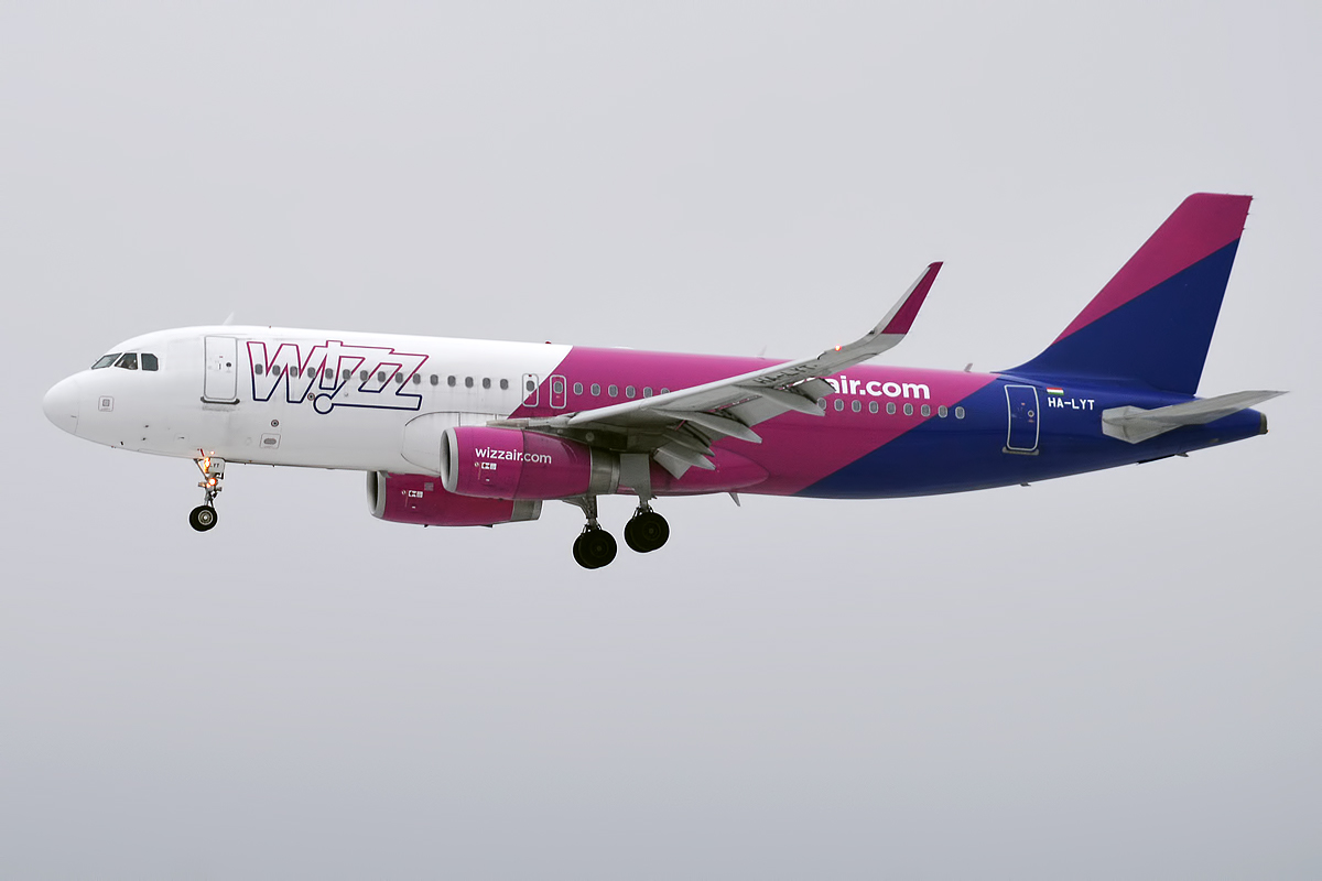 Wizz Air, HA-LYT, Airbus A320-232